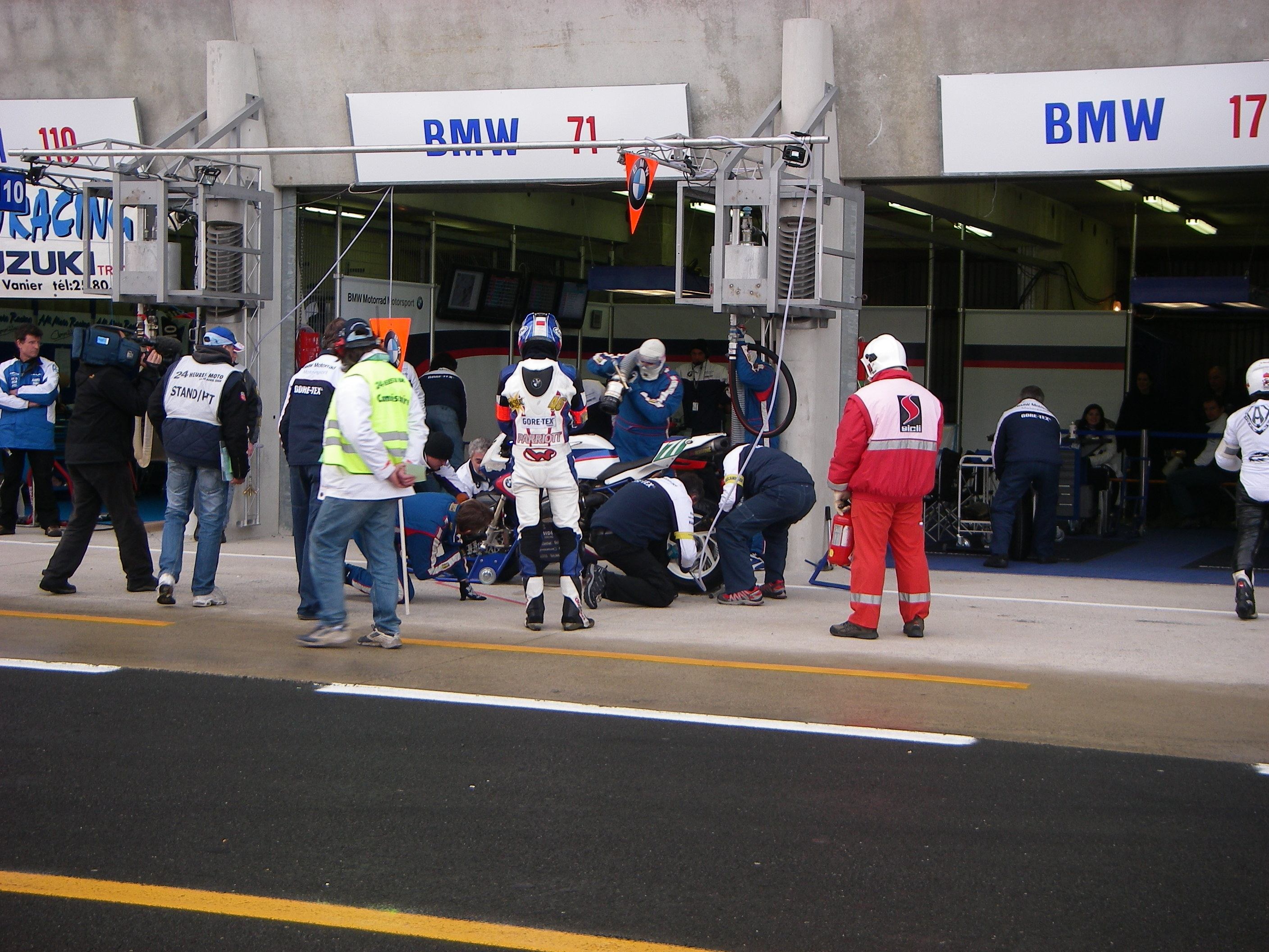 BMW Motorrad Motorsport Endurance Boxenstop Le Mans 2008